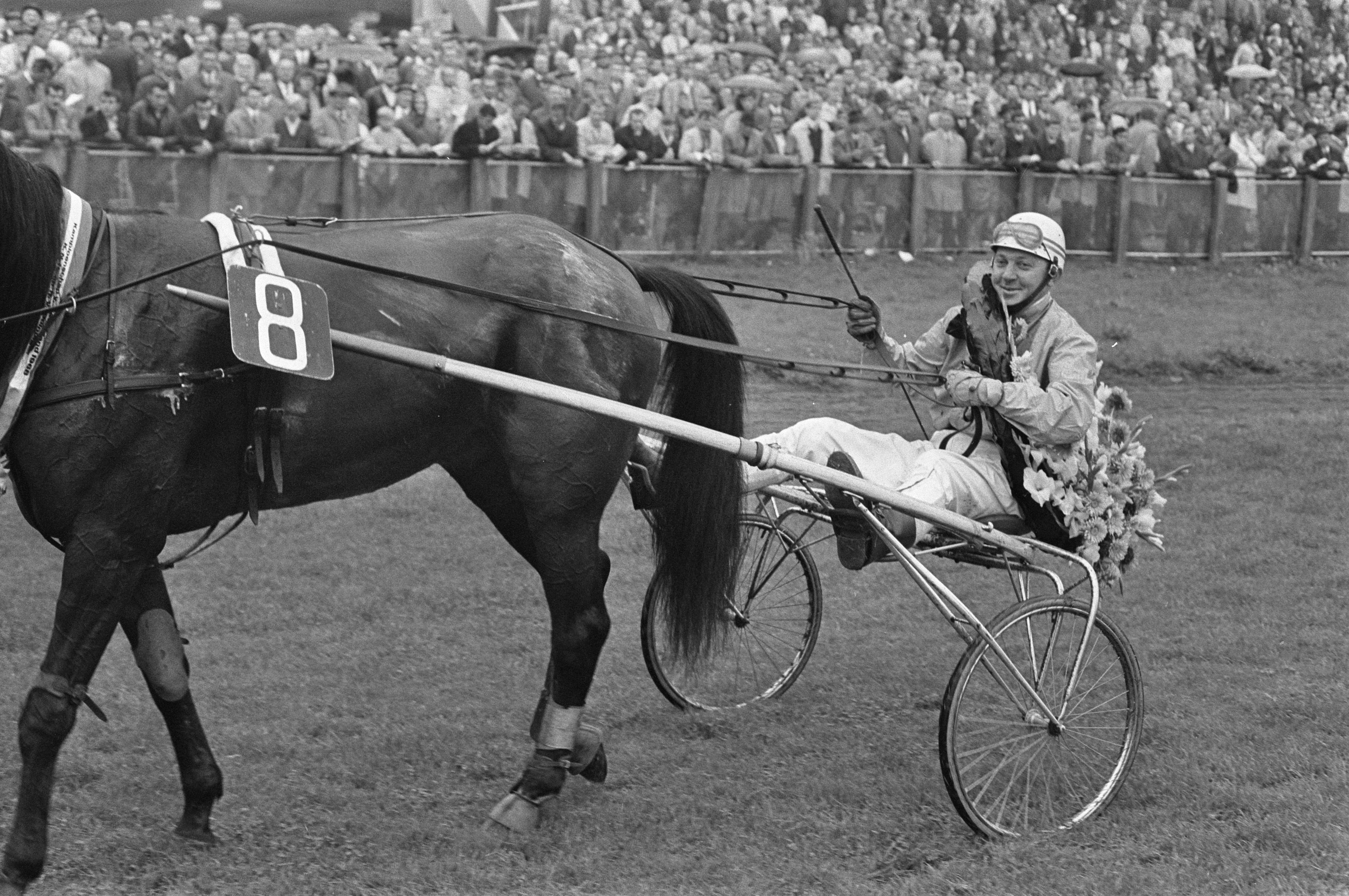 Collectie / Archief : Fotocollectie Anefo Reportage / Serie : Nederlandse kampioenschappen Draverijen op Duindigt Beschrijving : Jan van Dooyeweerd poseert met zijn paard Blazing Song Datum : 15 september 1968 Locatie : Wassenaar, Zuid-Holland Trefwoorden : paardensport, portretten Persoonsnaam : Dooyeweerd, Jan van Instellingsnaam : Duindigt Fotograaf : Ron Kroon / Anefo Auteursrechthebbende : Nationaal Archief Materiaalsoort : Negatief (zwart/wit) Nummer archiefinventaris : bekijk toegang 2.24.01.05 Bestanddeelnummer : 921-6821